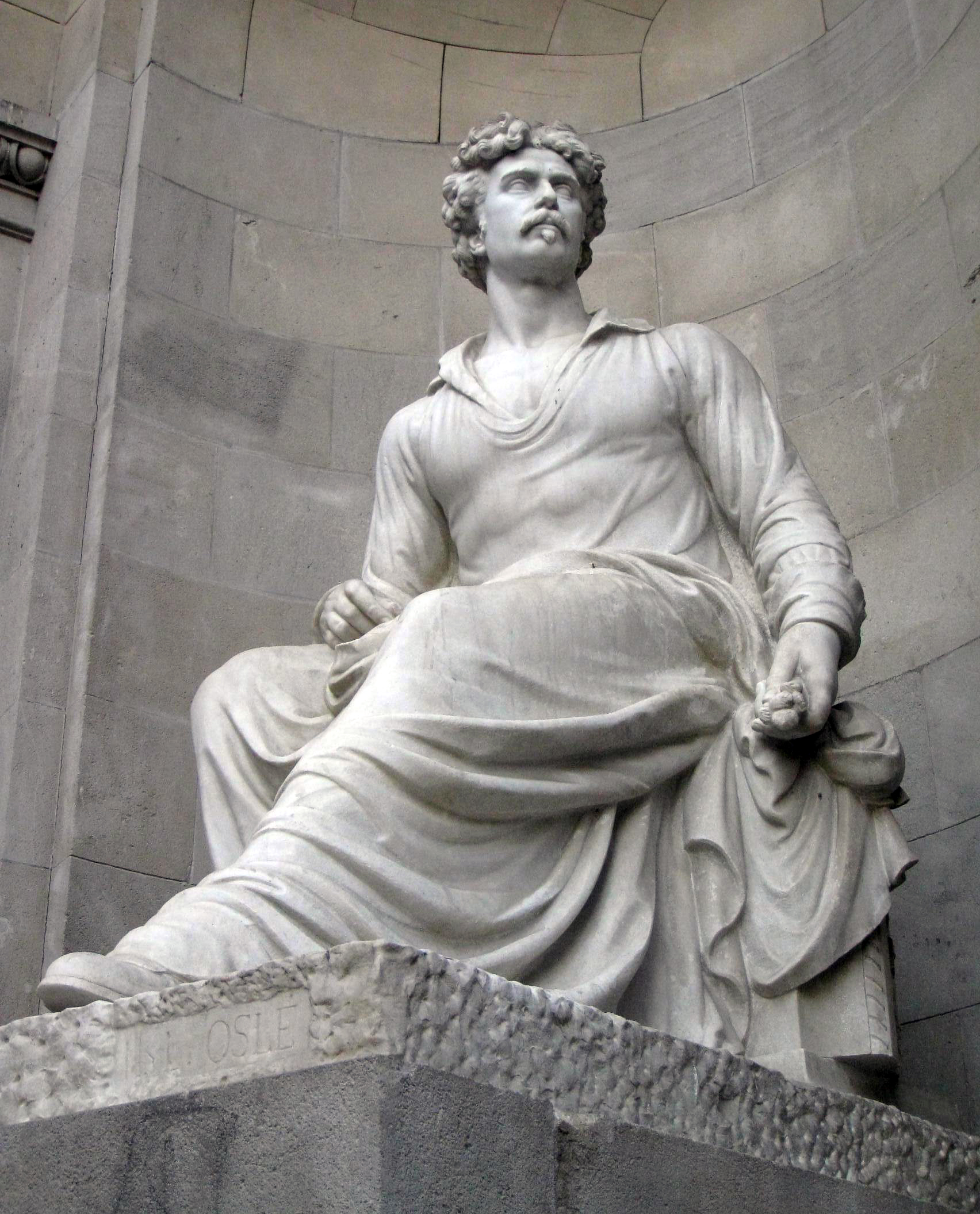 A Marià Fortuny (Miquel Oslé). C. Pintor Fortuny amb c. Xuclà (Barcelona)